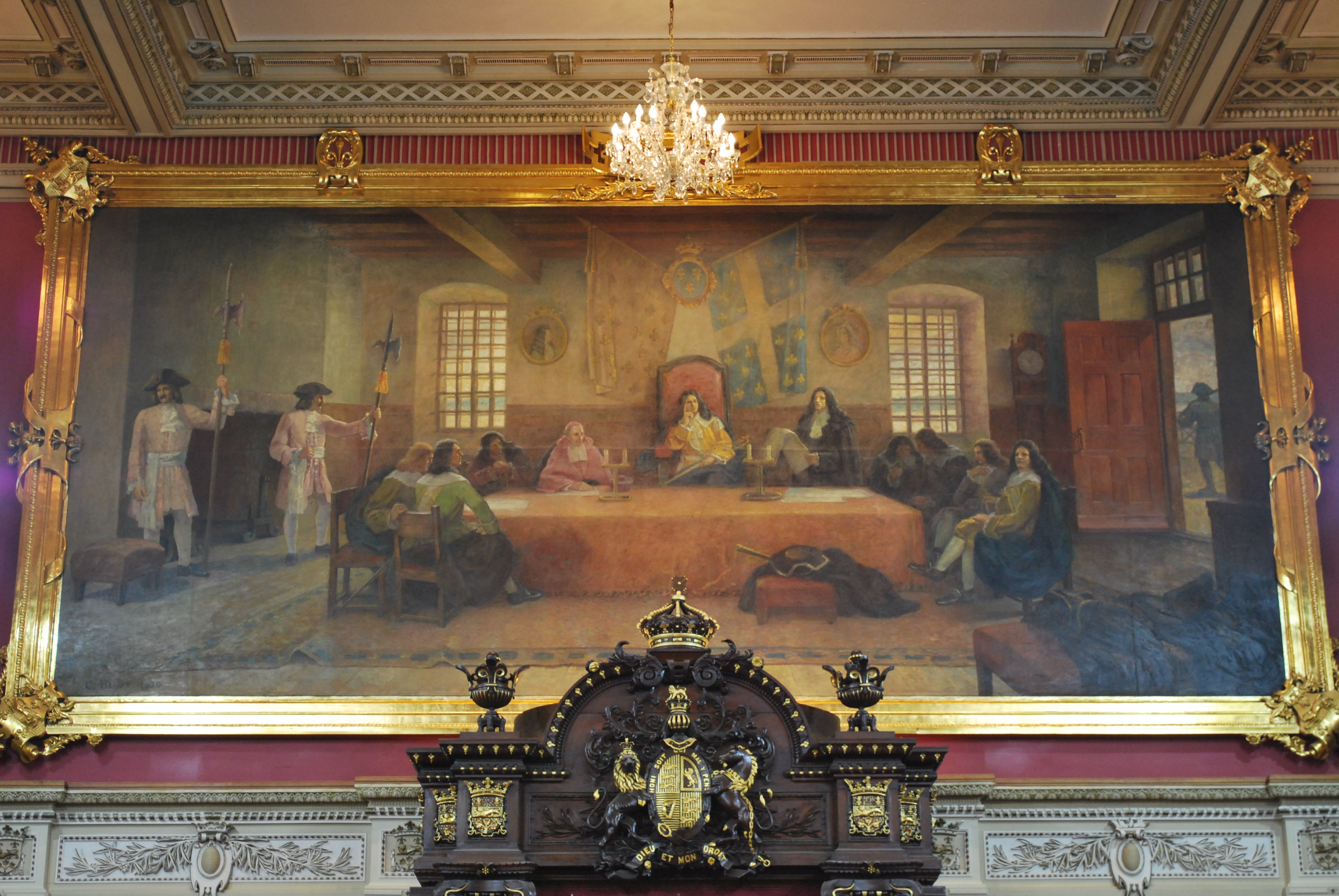 Le Conseil souverain de Charles Huot. Tableau sur un mur du salon rouge de l'hôtel du Parlement, à Québec. Huile sur toile, environ 3,9 m x 8,7 m.